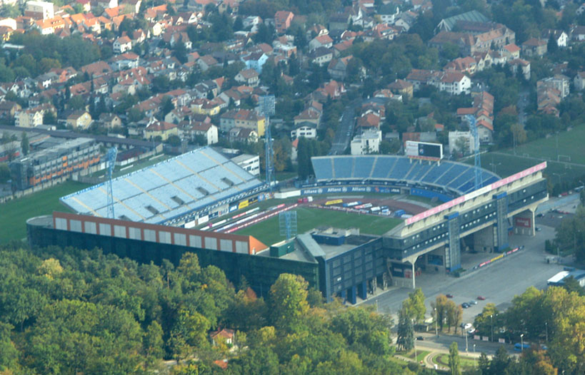 Maksimirski stadion, Zagreb, iz zraka